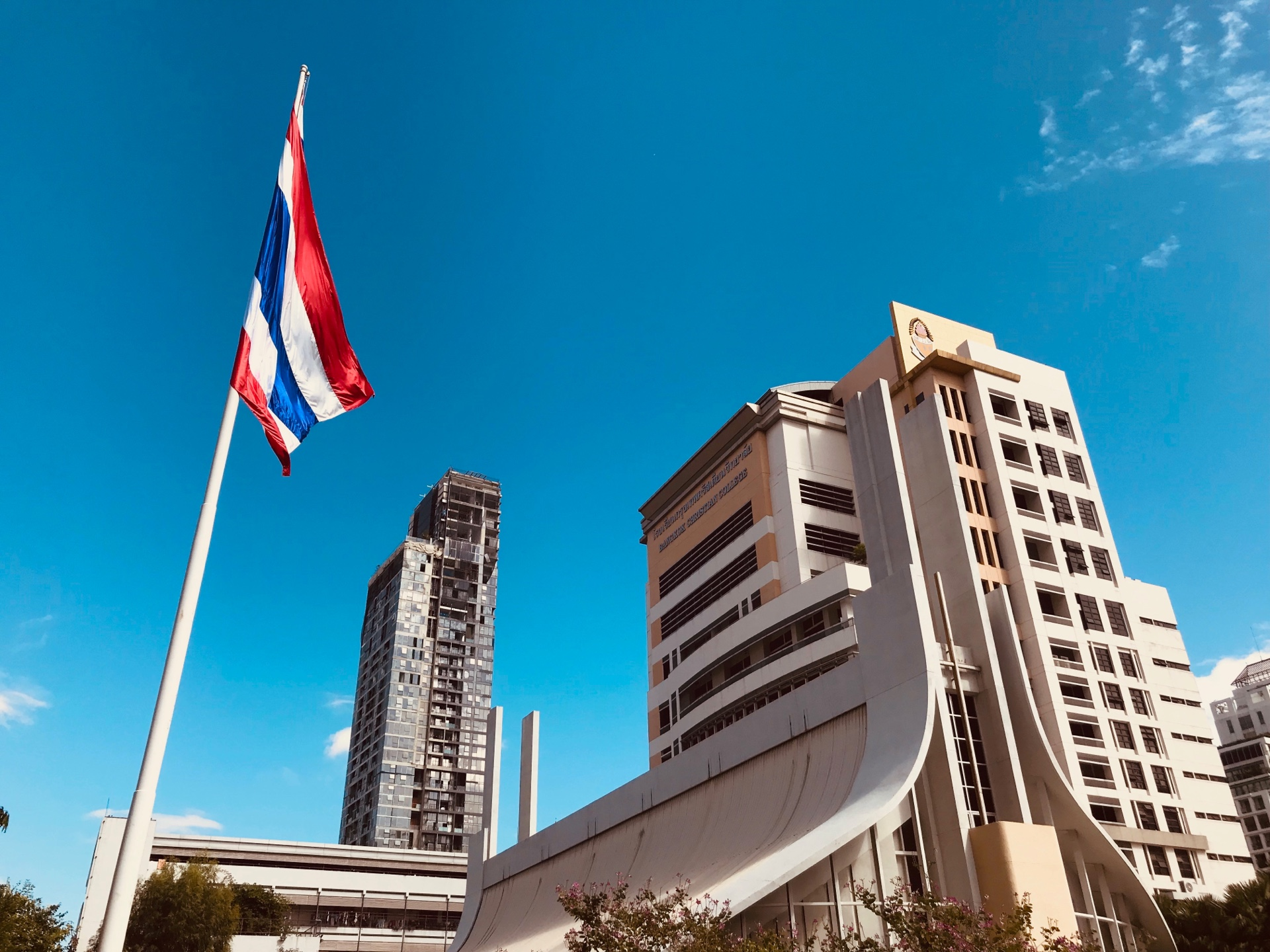 อาคารในกรุงเทพคริสเตียนวิทยาลัย ประกอบด้วย อาคารจอห์น เอ. เอกิ้น, หอธรรม และอาคารย์อารีย์ เสมประสาท